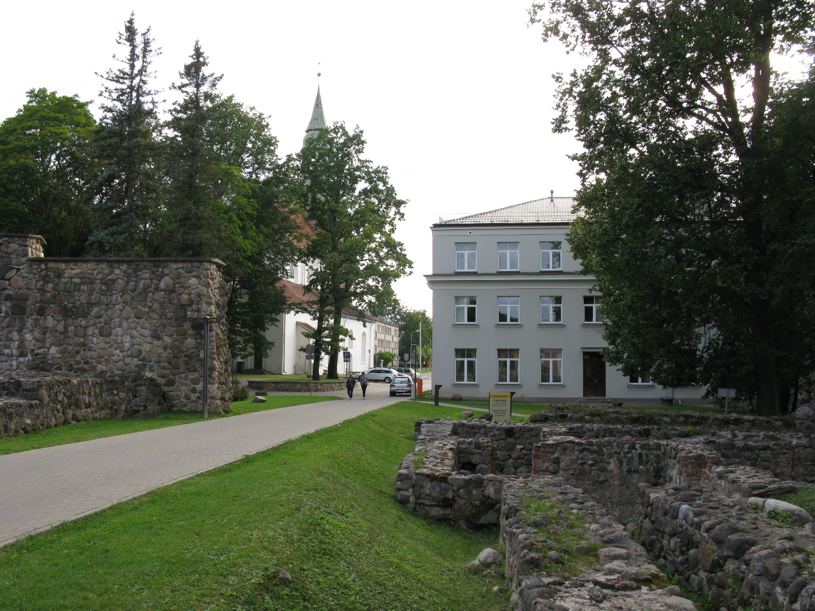 Vaade kirdest I eeslinnuse väravaavale. Tagaplaanil Püha Simeoni linnakirik ja Volmari kesklinn.